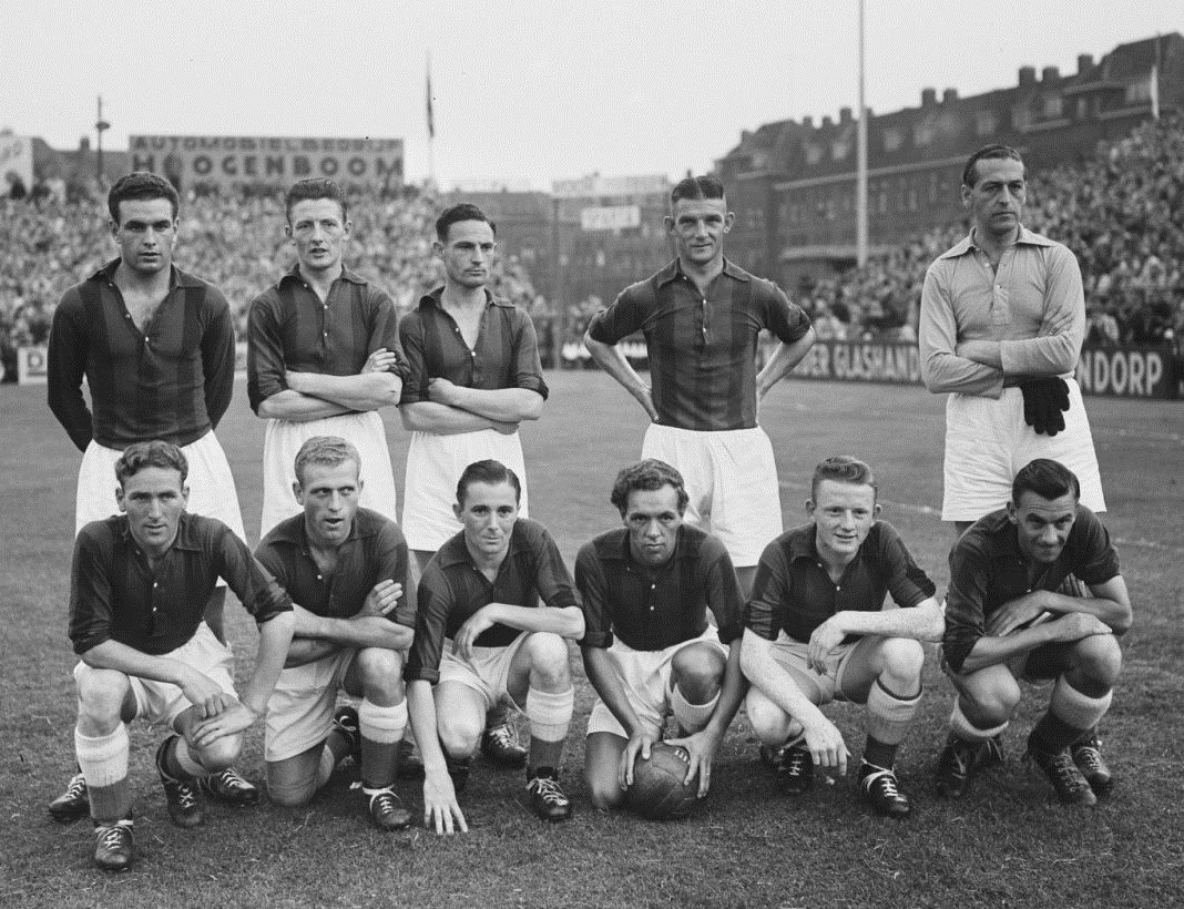 RCH tegen Sparta. RCH elftal.